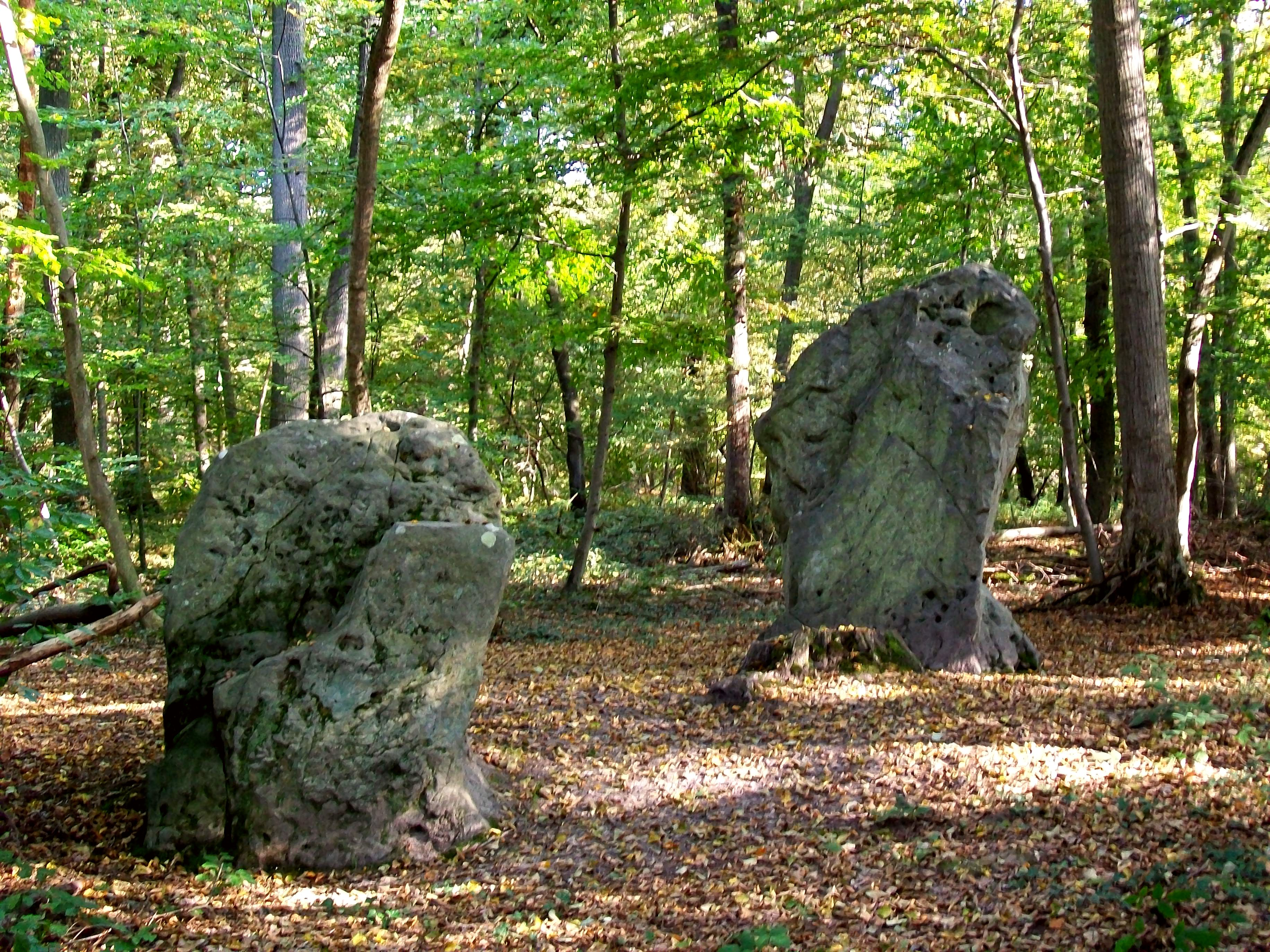 Les menhirs dits "des Indrolles" dans la forêt domaniale d'Halatte, situés sur le territoire de la commune de Senlis (60) dans la parcelle 296 non loin de la D 1017.